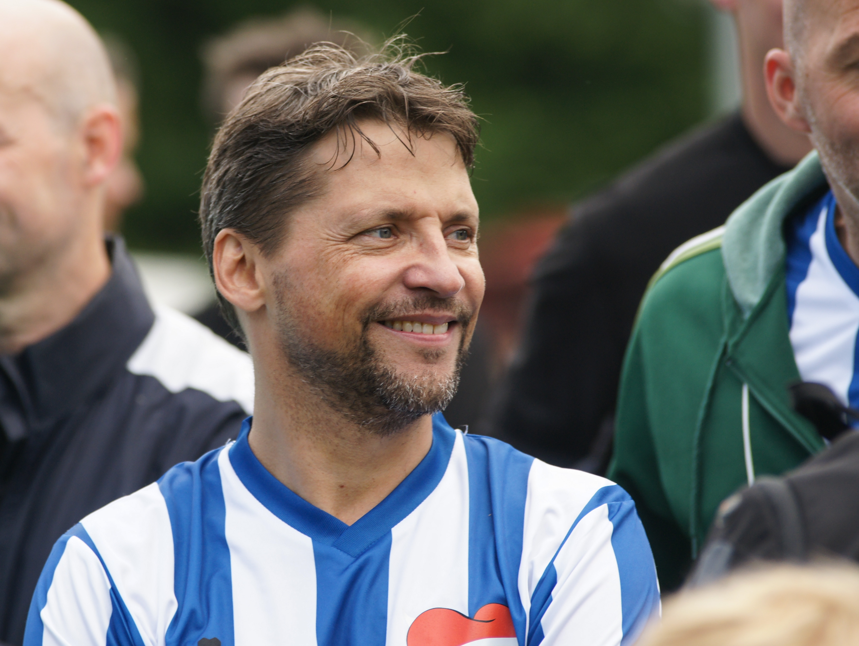 Kicken mit Herz, Charity Fußballspiel zugunsten der Kinder-Herz-Station des UKE